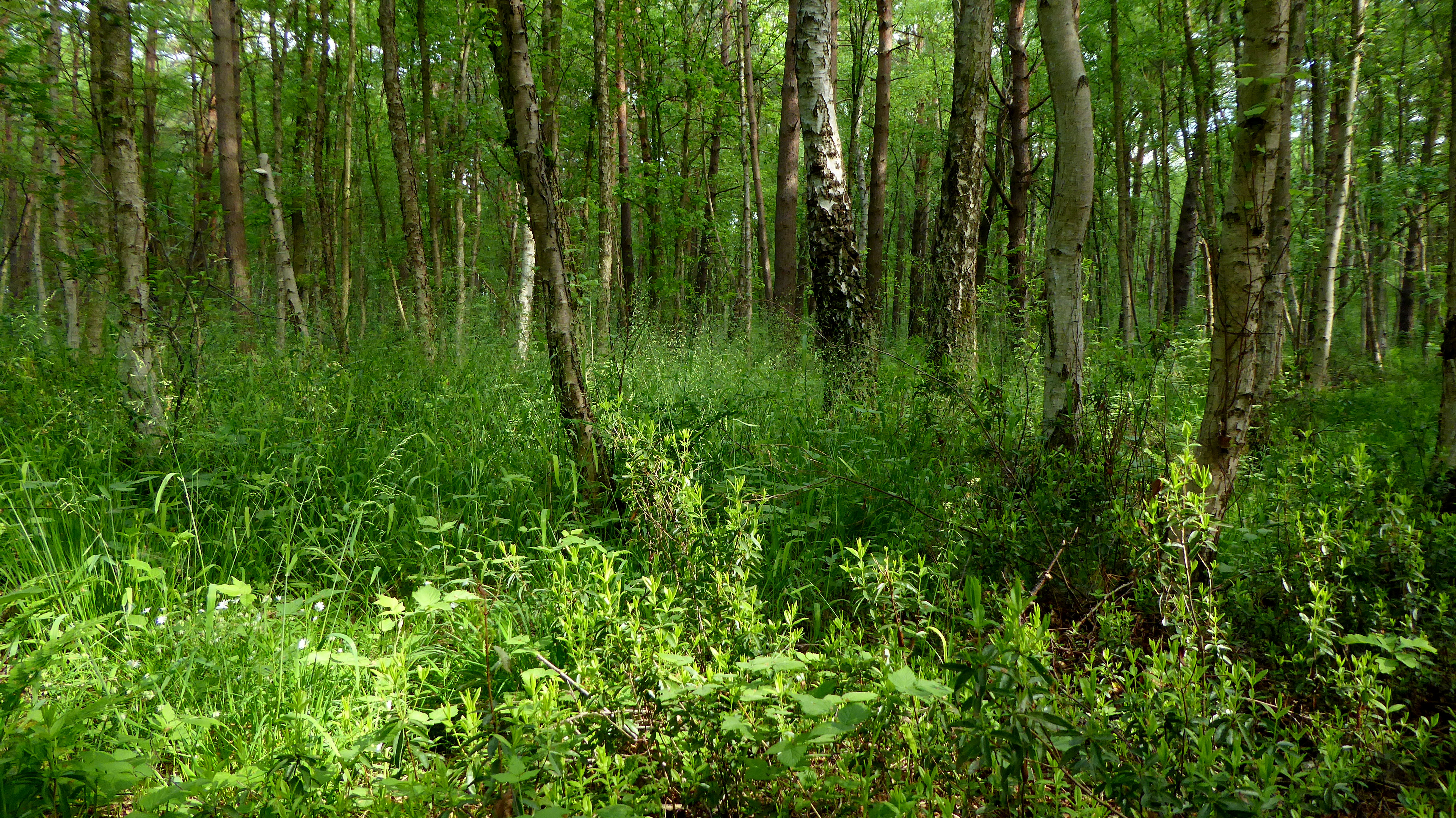 Im Birkenbruchwald wächst die Schmalblättrige Lorbeerrose (Kalmia angustifolia), die im Schatten der Bäume keine Blütenknospen bildet. Abgebildeter Bereich in Isernhagen im Naturschutzgebiet „Altwarmbüchener Moor“ (NSG HA 044) und im FFH-Gebiet DE-3525-331 „Altwarmbüchener Moor“.